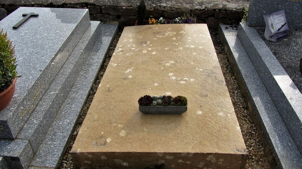 Tombe de S.U.Zanne au Cimetière de Flacé (Mâcon)